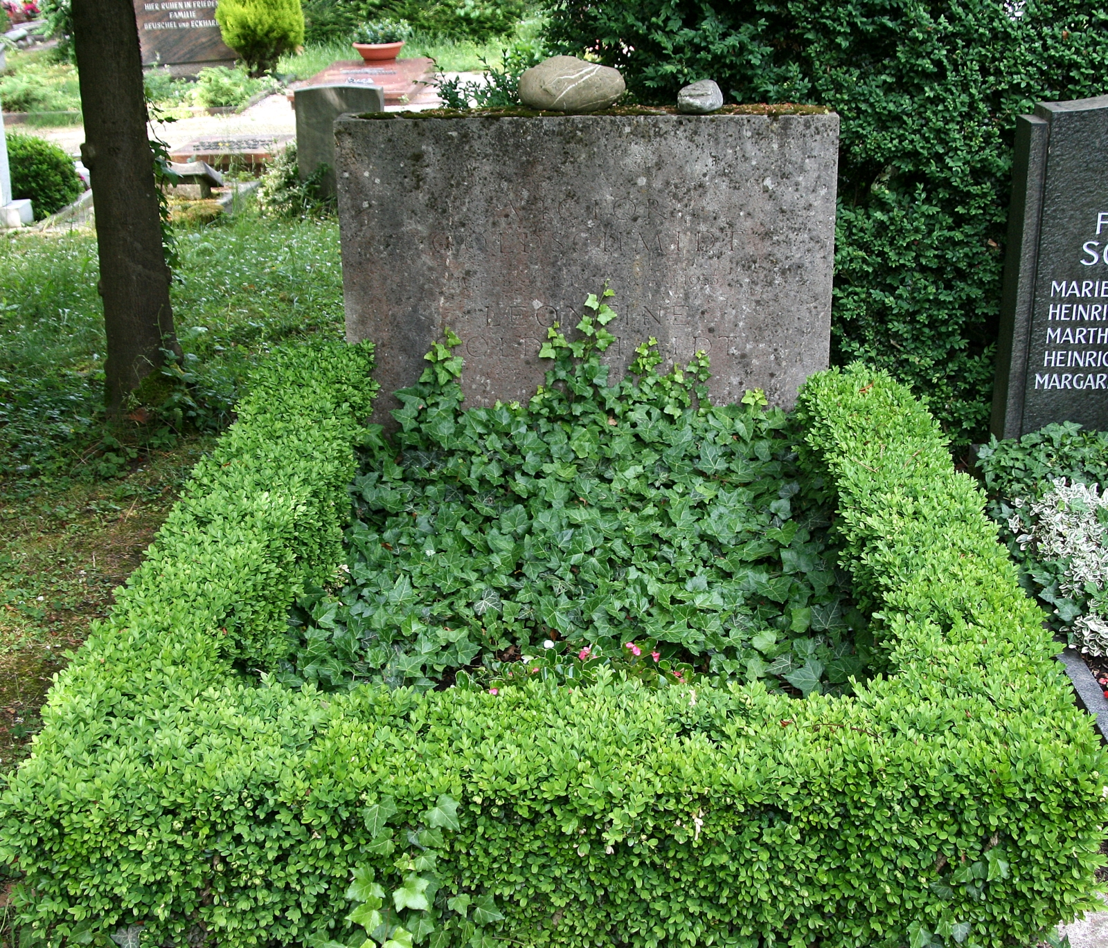 V Goldschmidts Grab